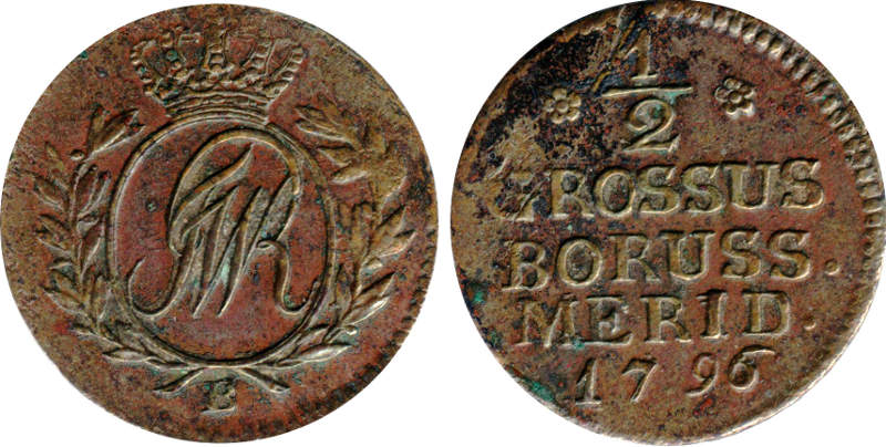 Pol grosza 1796 B BORUSS MERID